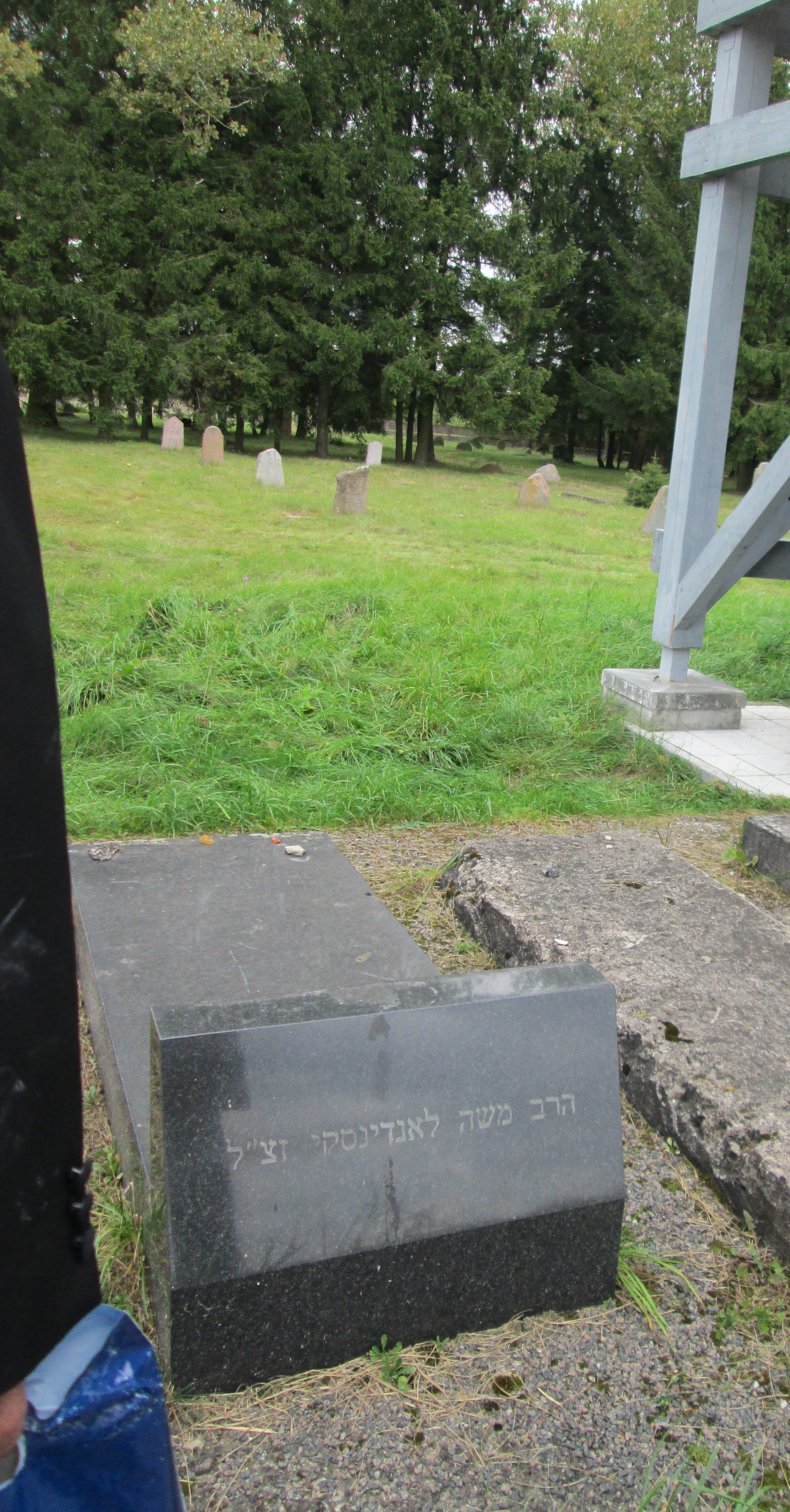 מצבת קברו של הרב לנדינסקי